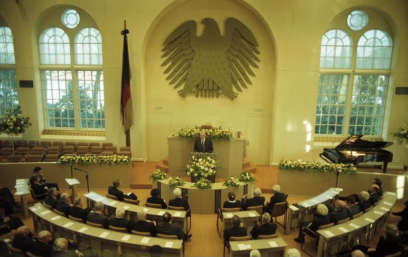 Bonn, 12. Januar 1990 Trauerstaatsakt für den am 31.12.1989 verstorbenen ehemaligen Bundesminister Dr. Gerhard Schröder. In Anwesenheit des Bundespräsidenten, des Präsidenten des Bundesverfassungsgerichts und von Mitgliedern der Bundesregierung, des Bundestages und des Bundesrates würdigten Bundestagspräsidentin Prof. Rita Süssmuth, Bundeskanzler Dr. Helmut Kohl und der frühere Bischof Dr. D. Hermann Kunst das politische Lebenswerk des Verstorbenen.